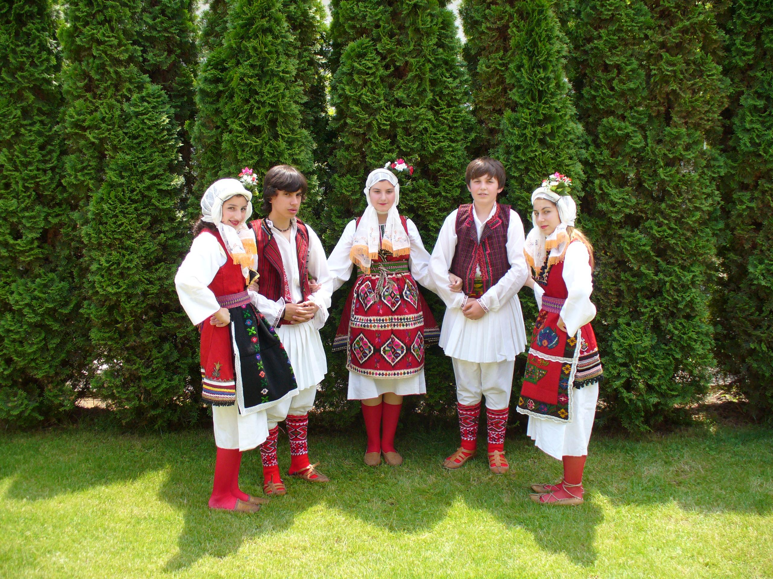 Машки и женски носии од селото Раштак - Скопје.